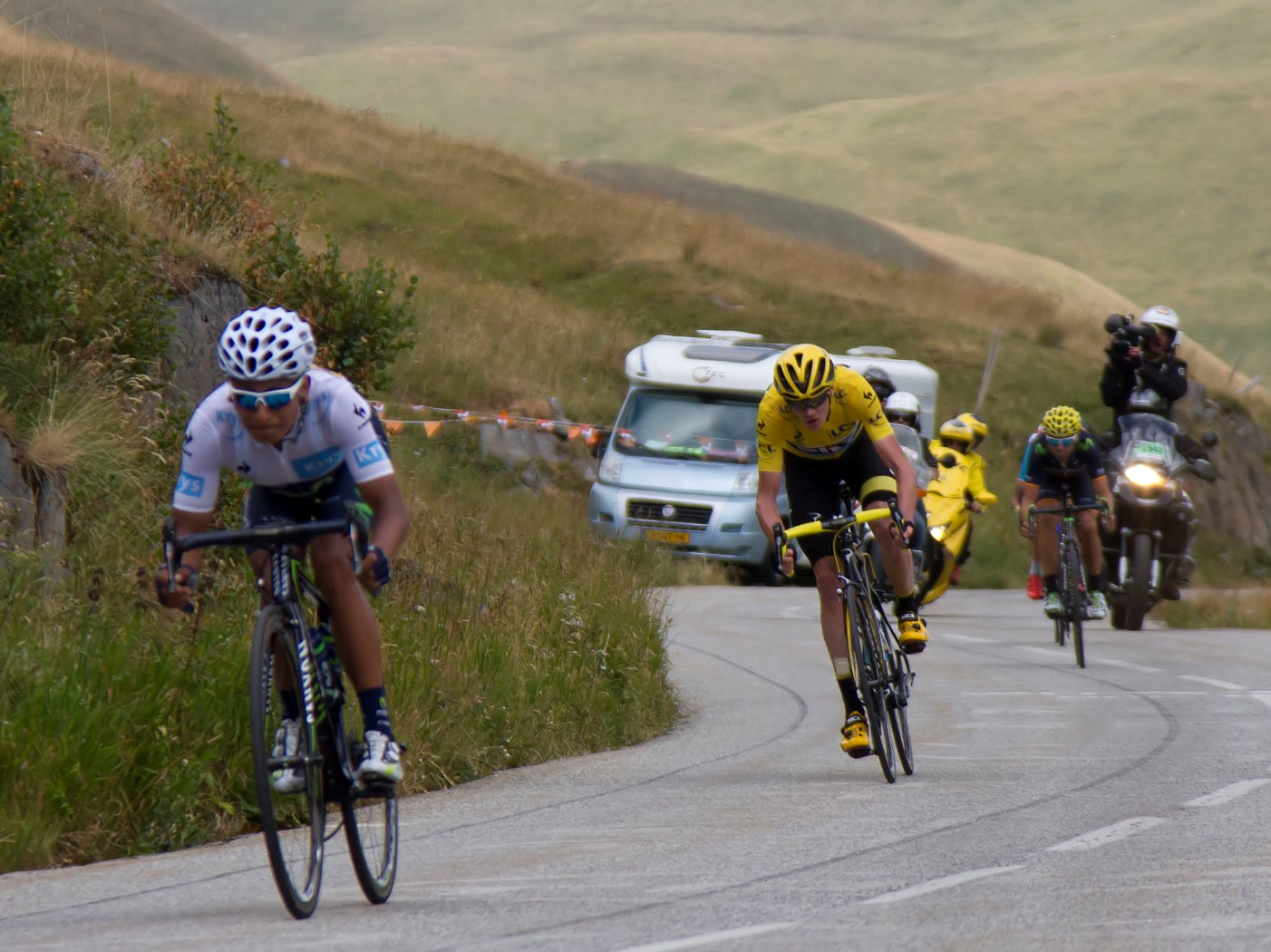 277 groep gele trui